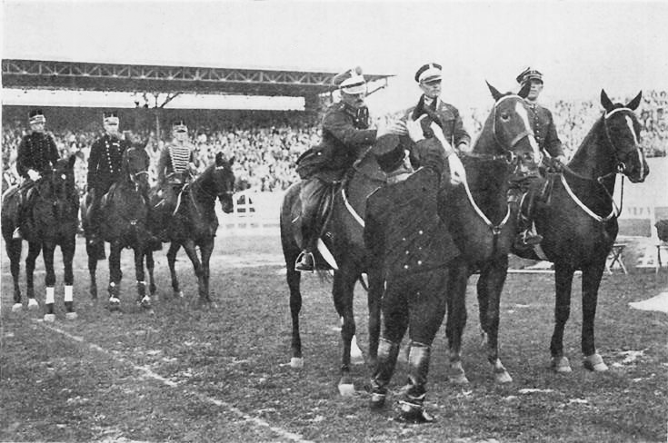 Les équipes polonaises et suédoises, deuxième et troisième par équipe en saut d'obstacles.